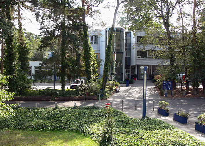 Der Landessportbund Hessen in der Otto-Fleck-Schneise in Frankfurt